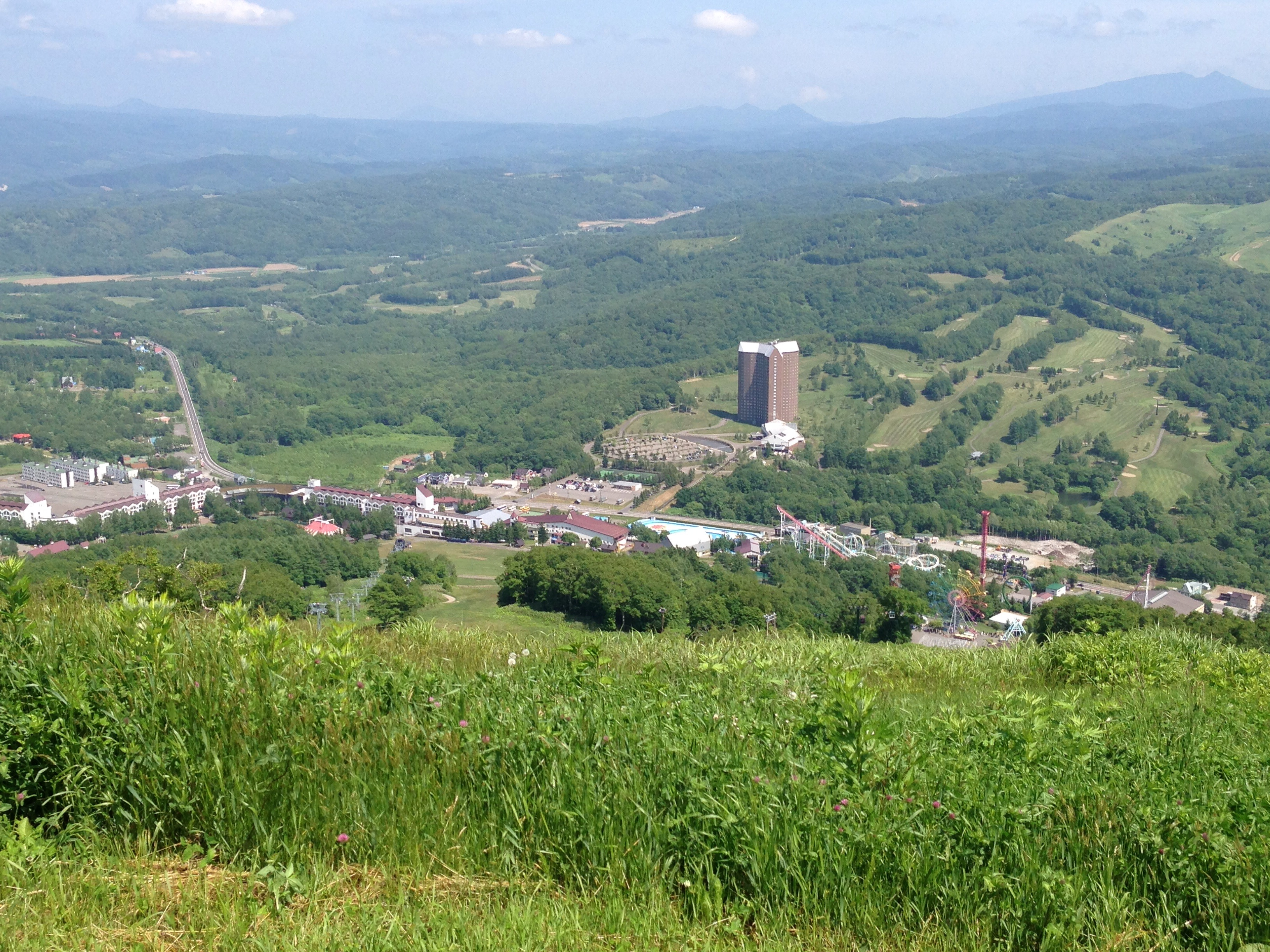 ルスツリゾート。北海道留寿都村。